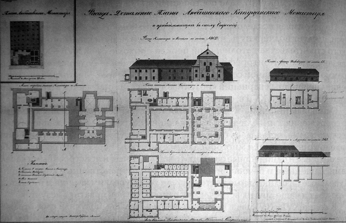 Беларуская (тарашкевіца): Любяшоў (Lubiašoŭ), вуліца Замкавая (vulica Zamkavaja). Касьцёл і кляштар капуцынаў